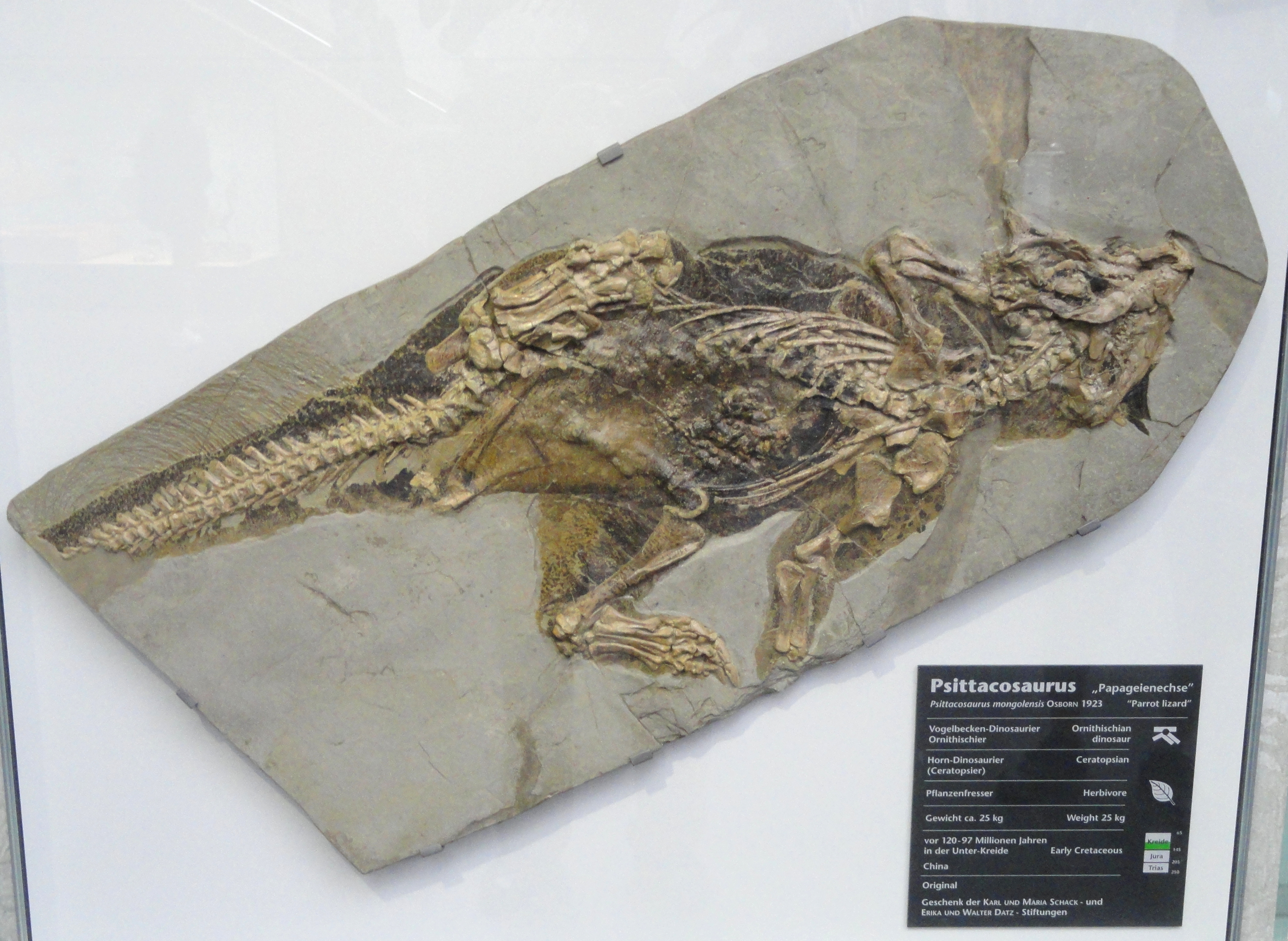 Exhibit in Naturmuseum Senckenberg, Frankfurt am Main, Germany.